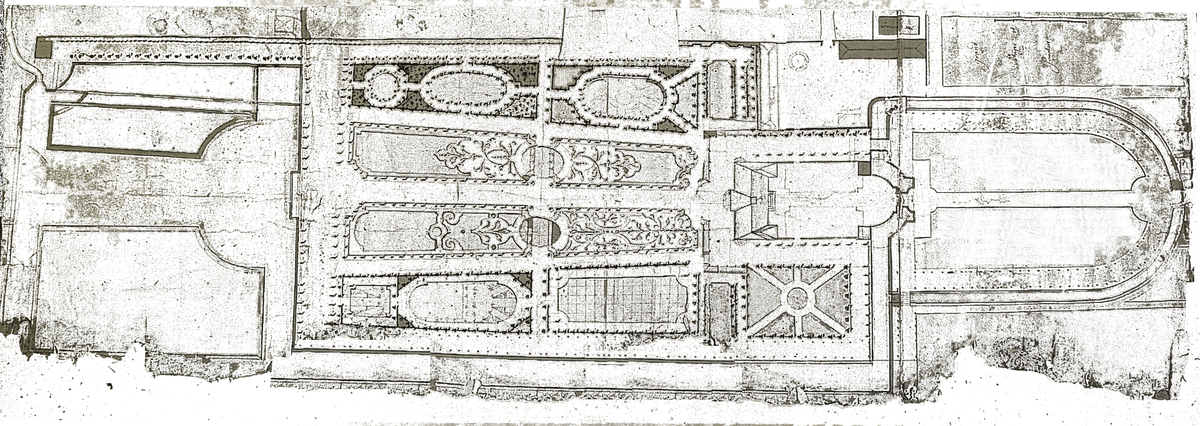 issu des collections du château.